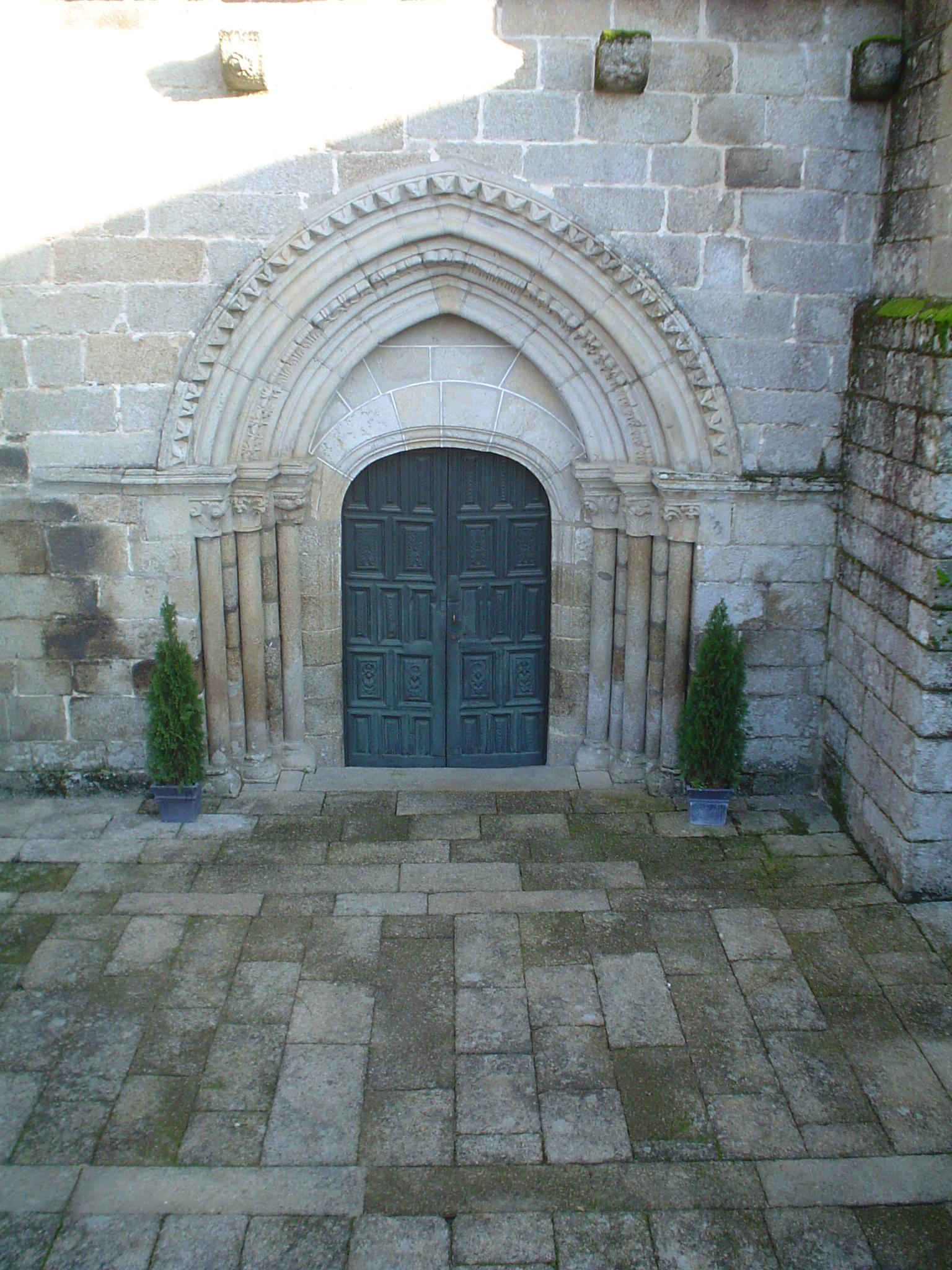 porta de aceso ao templo do mosteiro de San Clodio de Leiro